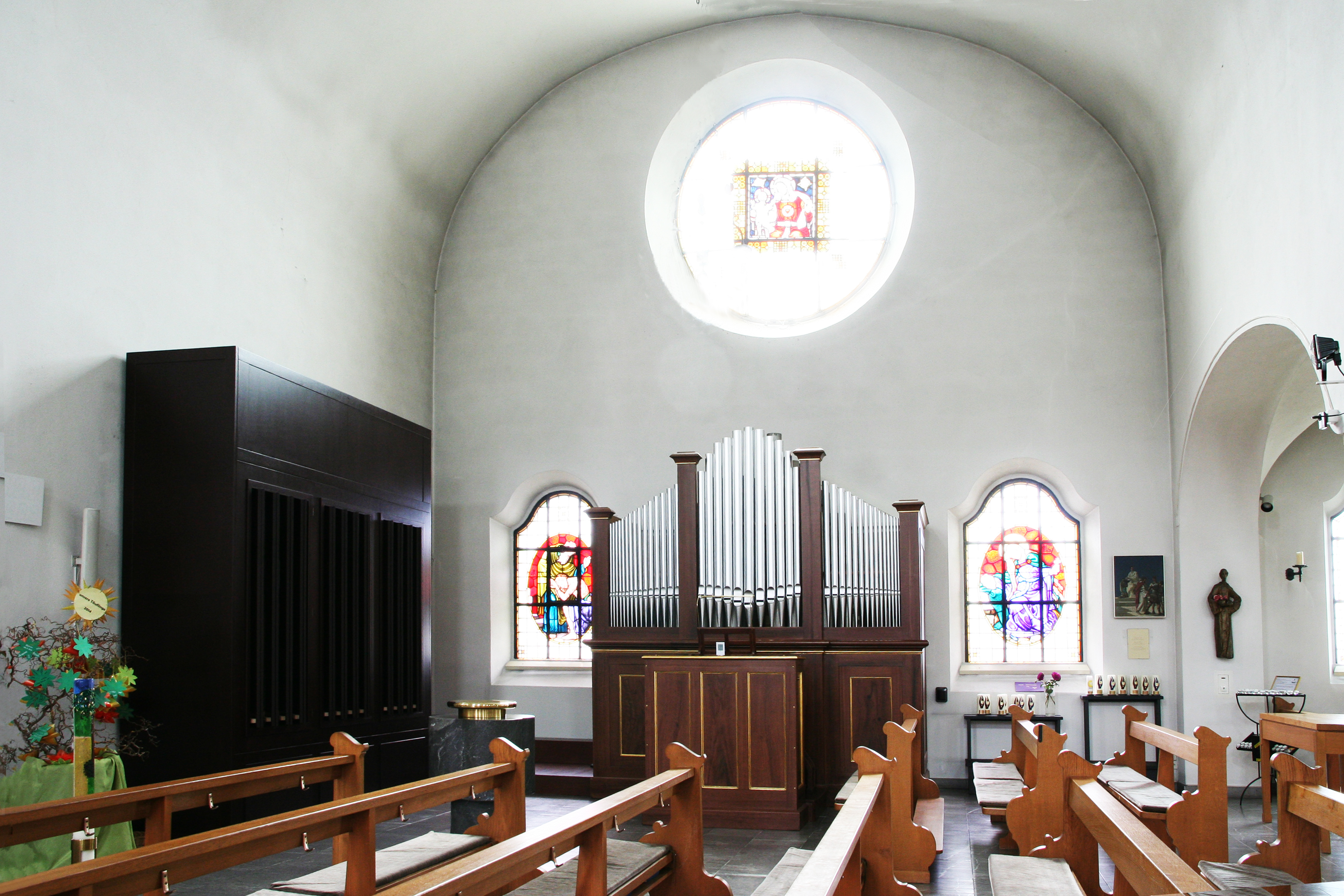 Römisch-katholische Pfarrkirche Richterswil, Chororgel